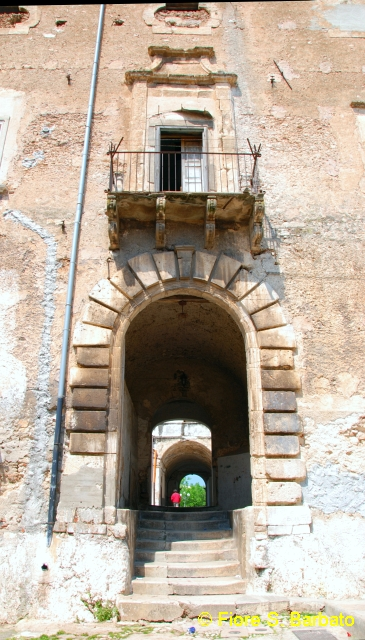 Palazzo Baronale di Cagnano Varano, in Provincia di Foggia